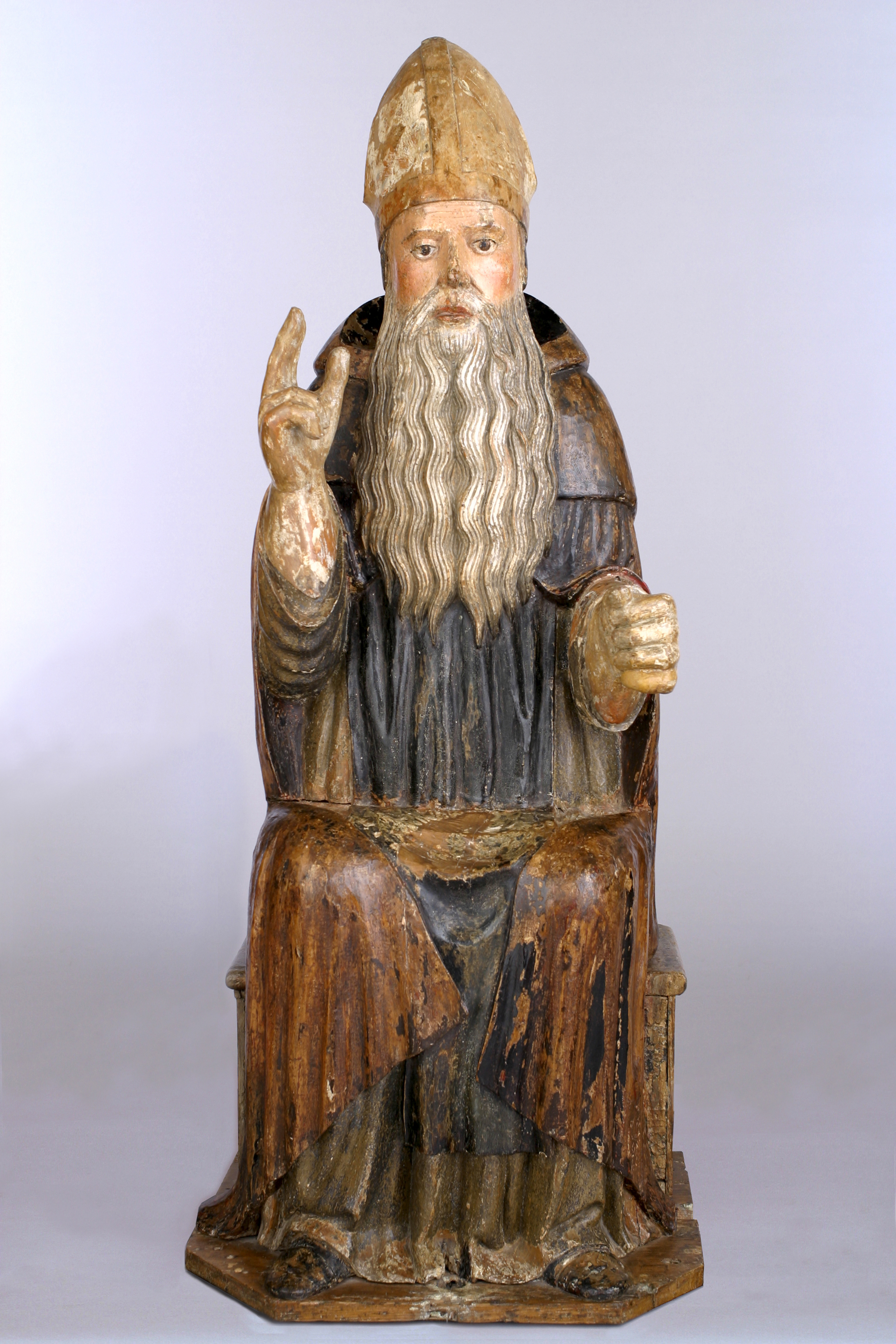 Giovanni Zabellana "Sant'Antonio Abate (visione laterale)" Legno dipinto, fine del XV sec. circa, 128cm Collezione Privata, Mantova